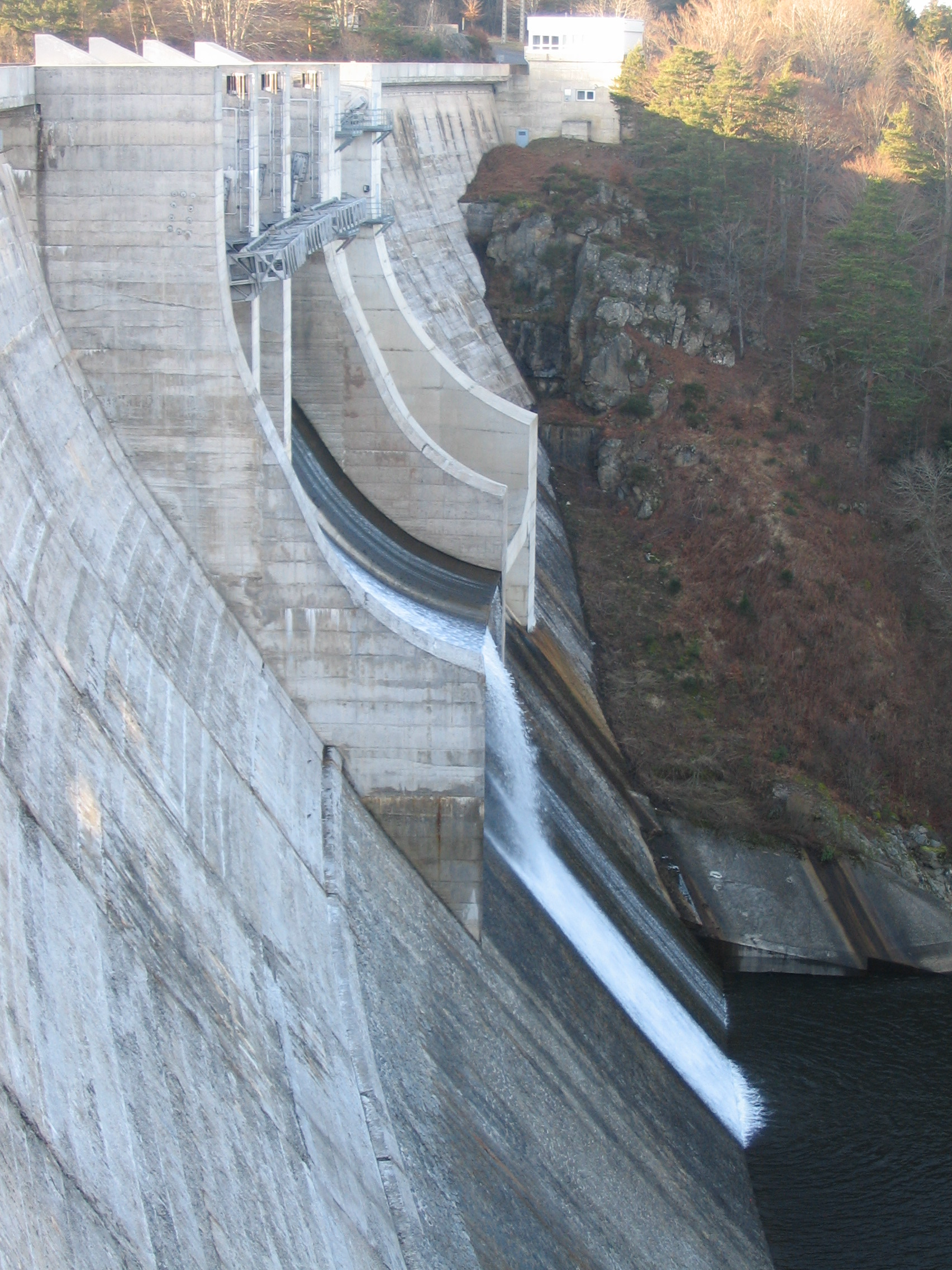 A une quinzaine de km à l'est d'Yssingeaux (Haute-Loire), le barrage de Lavalette, sur le Lignon du Velay, assure aujourd'hui une grande part de l'approvisionnement en eau potable de l'agglomération stéphanoise.